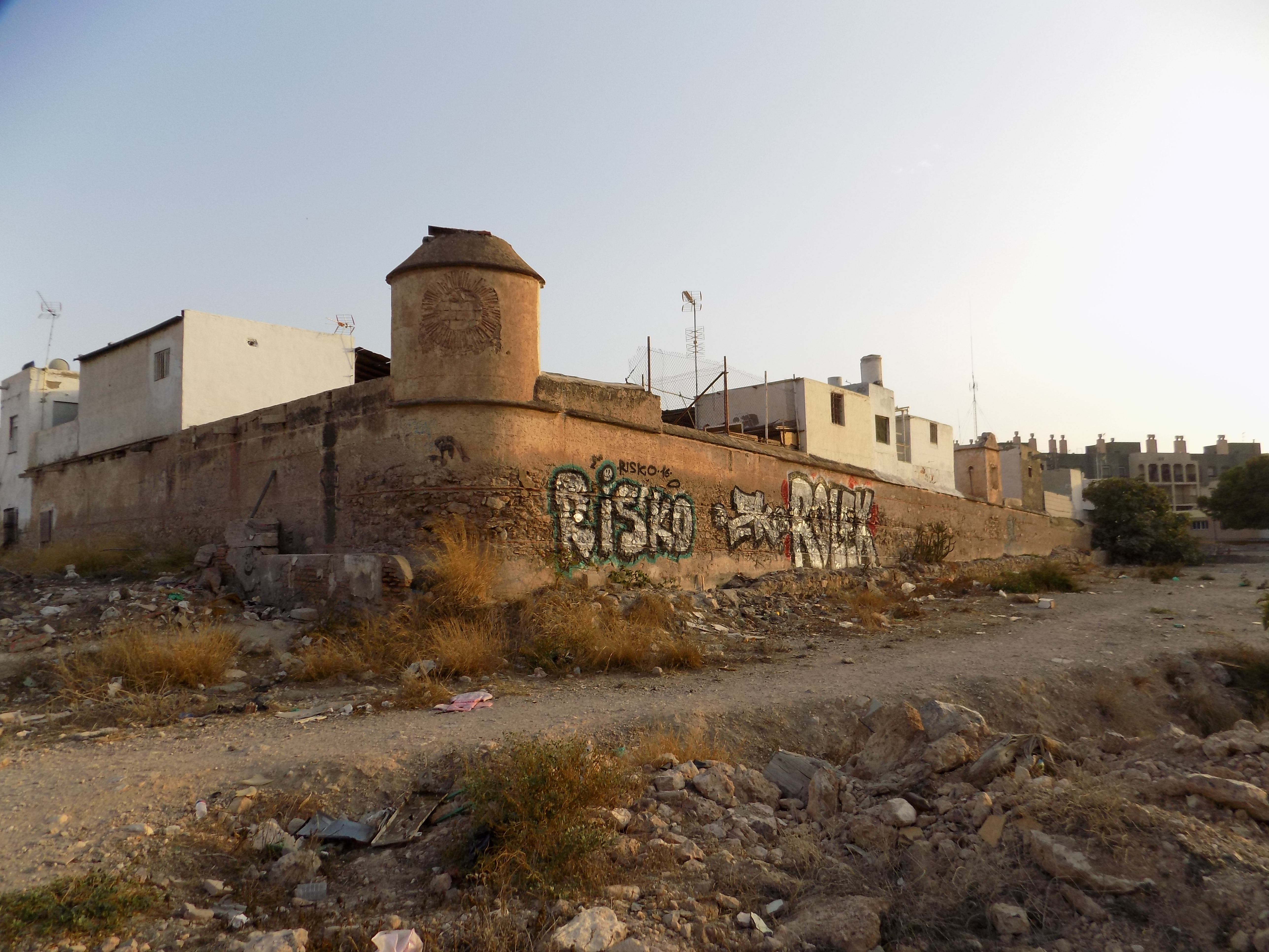 Muralla exterior del castillo del Diezmo